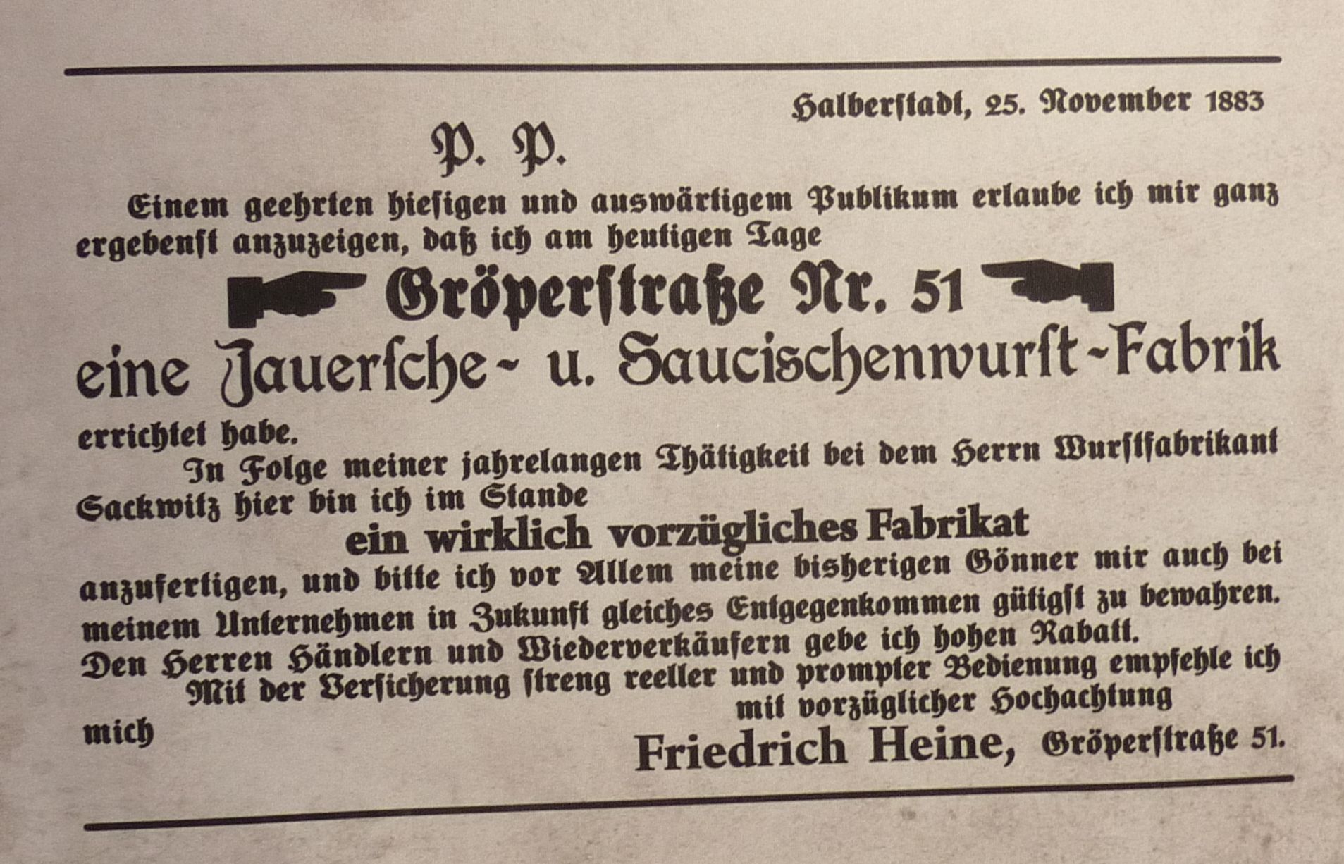 Würstchenannonce von Friedrich Heine